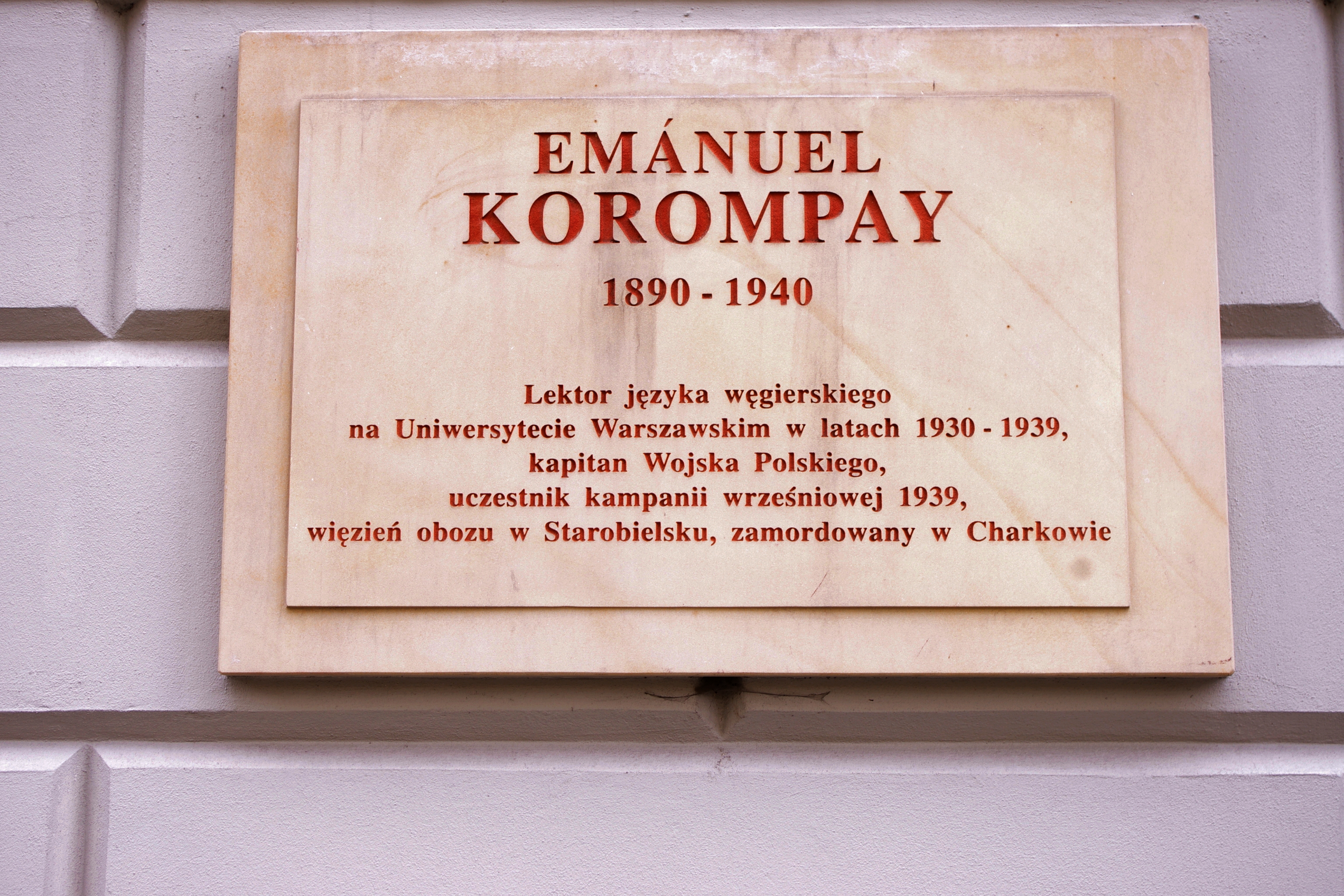 Tablica na gmachu Wydziału Orientalistycznego Uniwersytetu Warszawskiego upamiętniająca Aladára Emánuela Korompaya (1890-1940), wykładowcę języka węgierskiego na warszawskiej uczelni zamordowanego przez Sowietów w Charkowie.